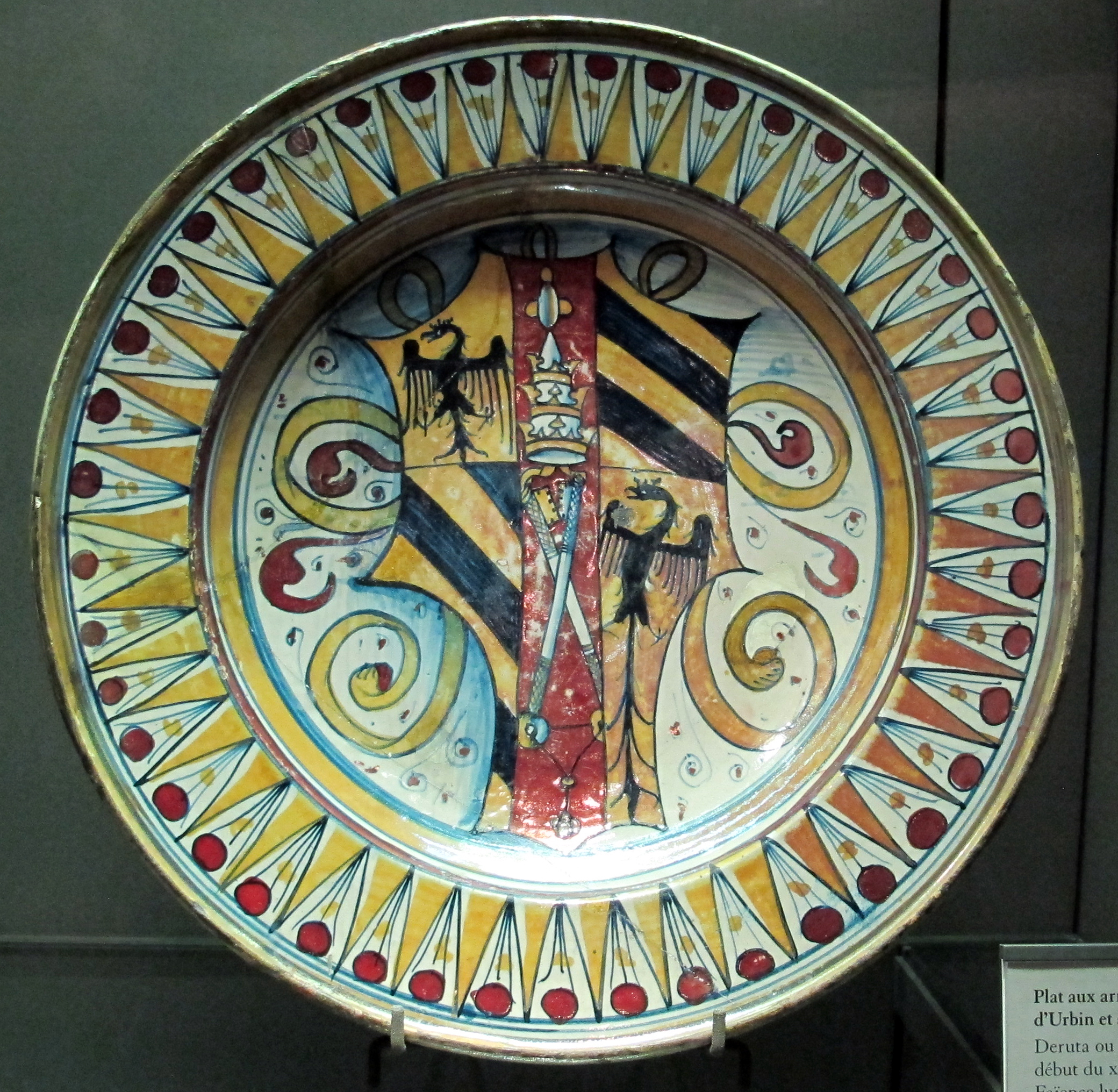 Maiolica al Louvre, Parigi